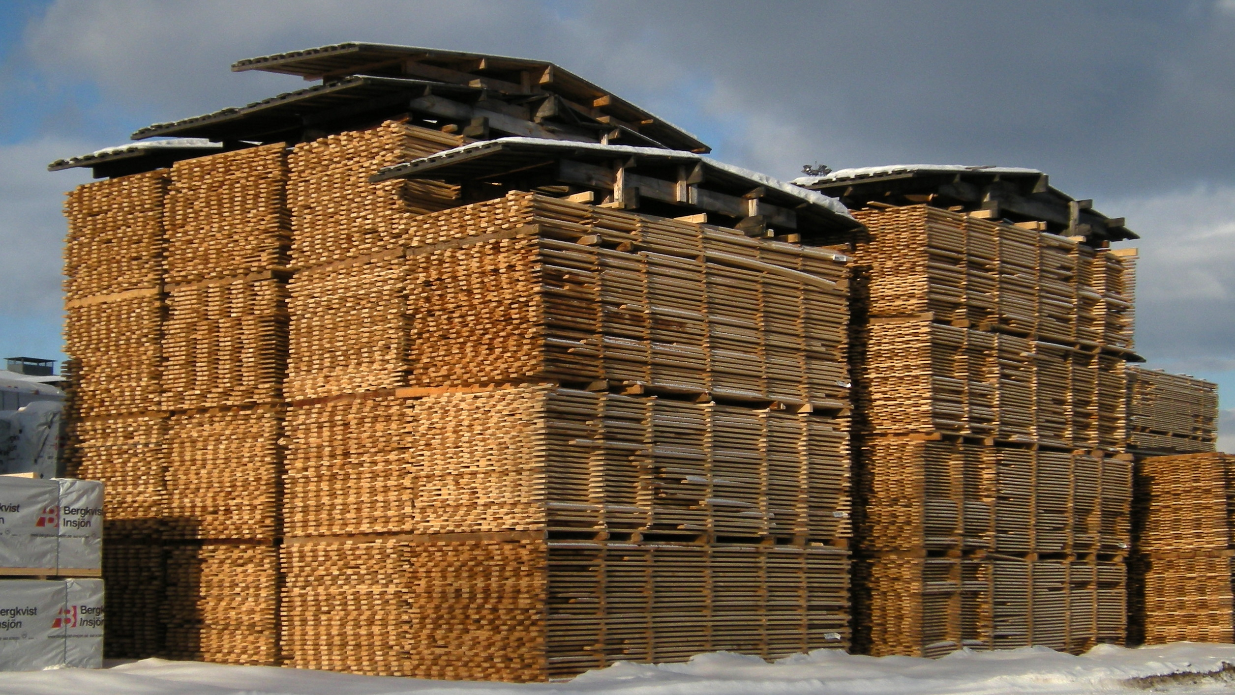 Virke vid Bergkvist-Insjön.